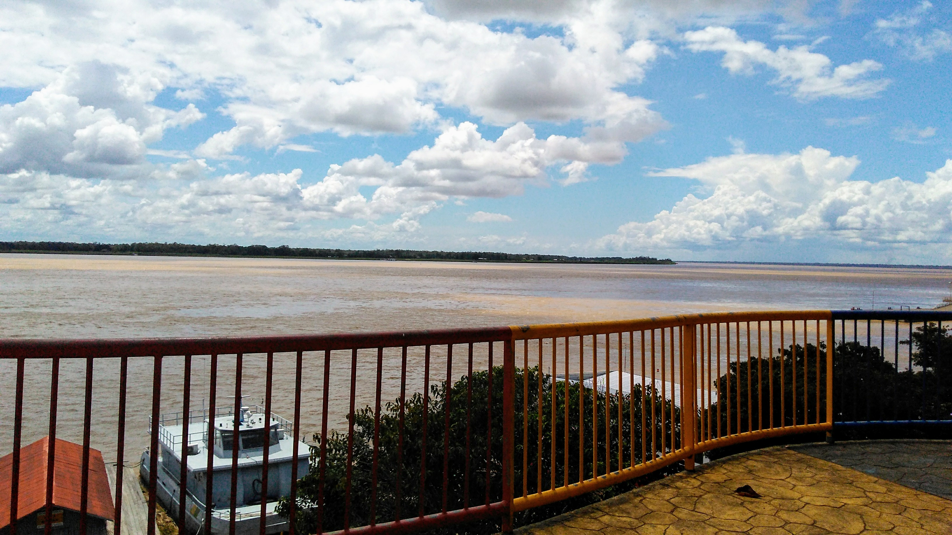 Trecho do Rio Amazonas próximo ao município brasileiro de Itacoatiara (AM).